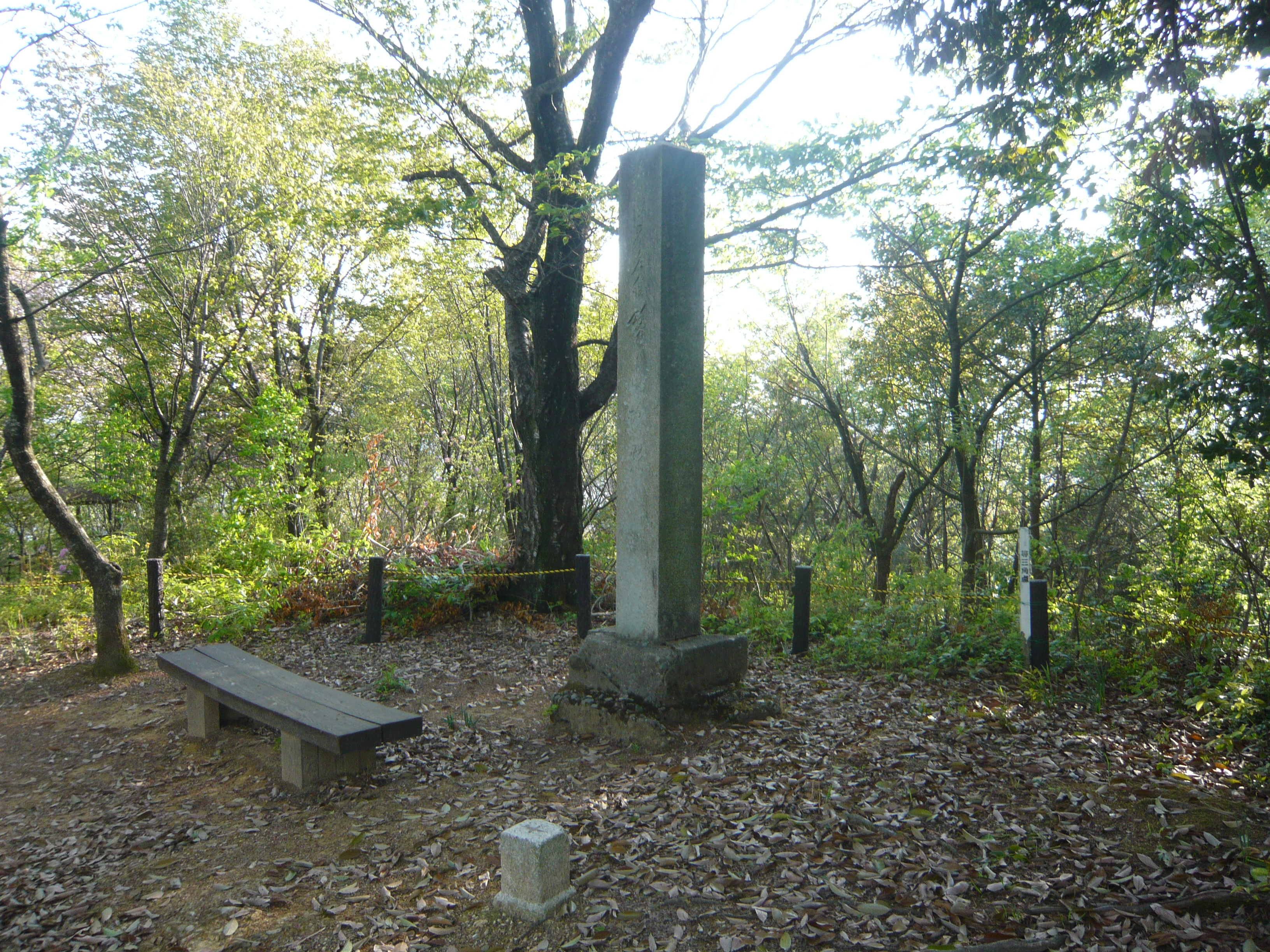 Sagiyama Castle 鷺山城跡の石碑（鷺山城）,Gifu,Gifu,Japan（岐阜県岐阜市）で撮影。